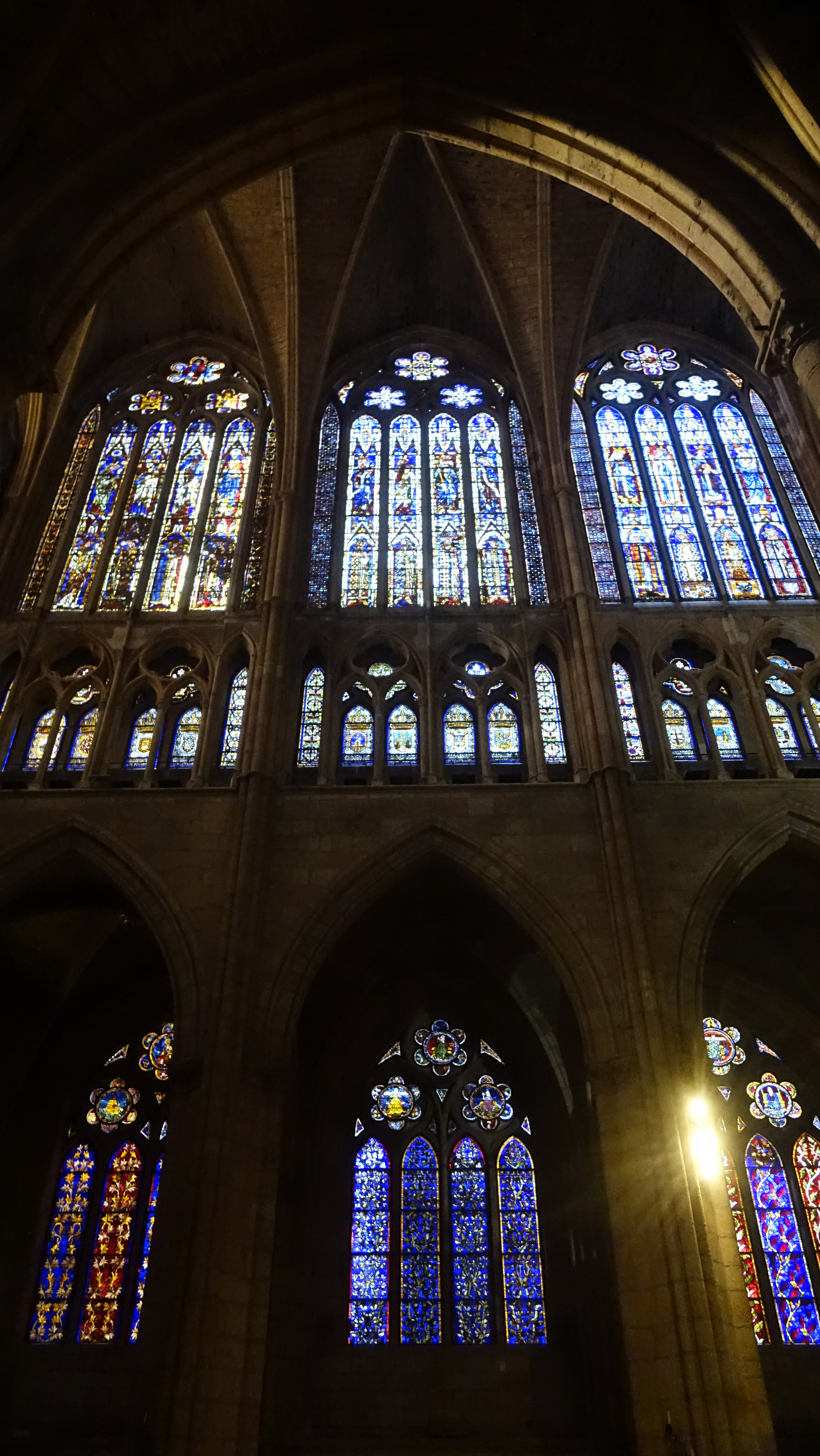 Claristorio, triforio y ventanales bajos de la catedral de León.